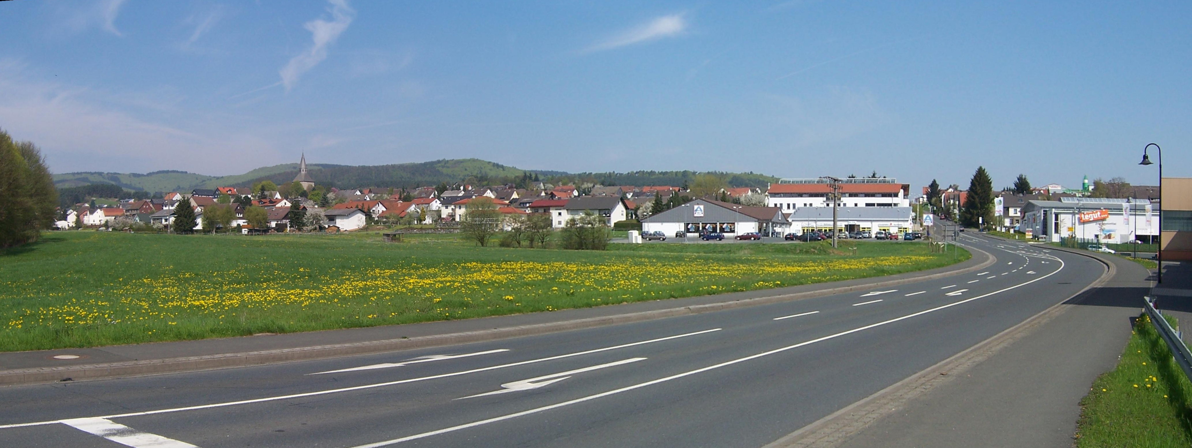 Ansicht von Dautphe von Süden am